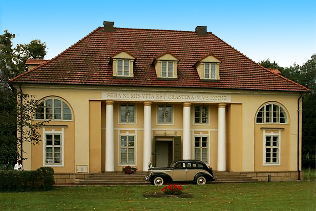 Poręba, pałacyk Bażantarnia, 1800